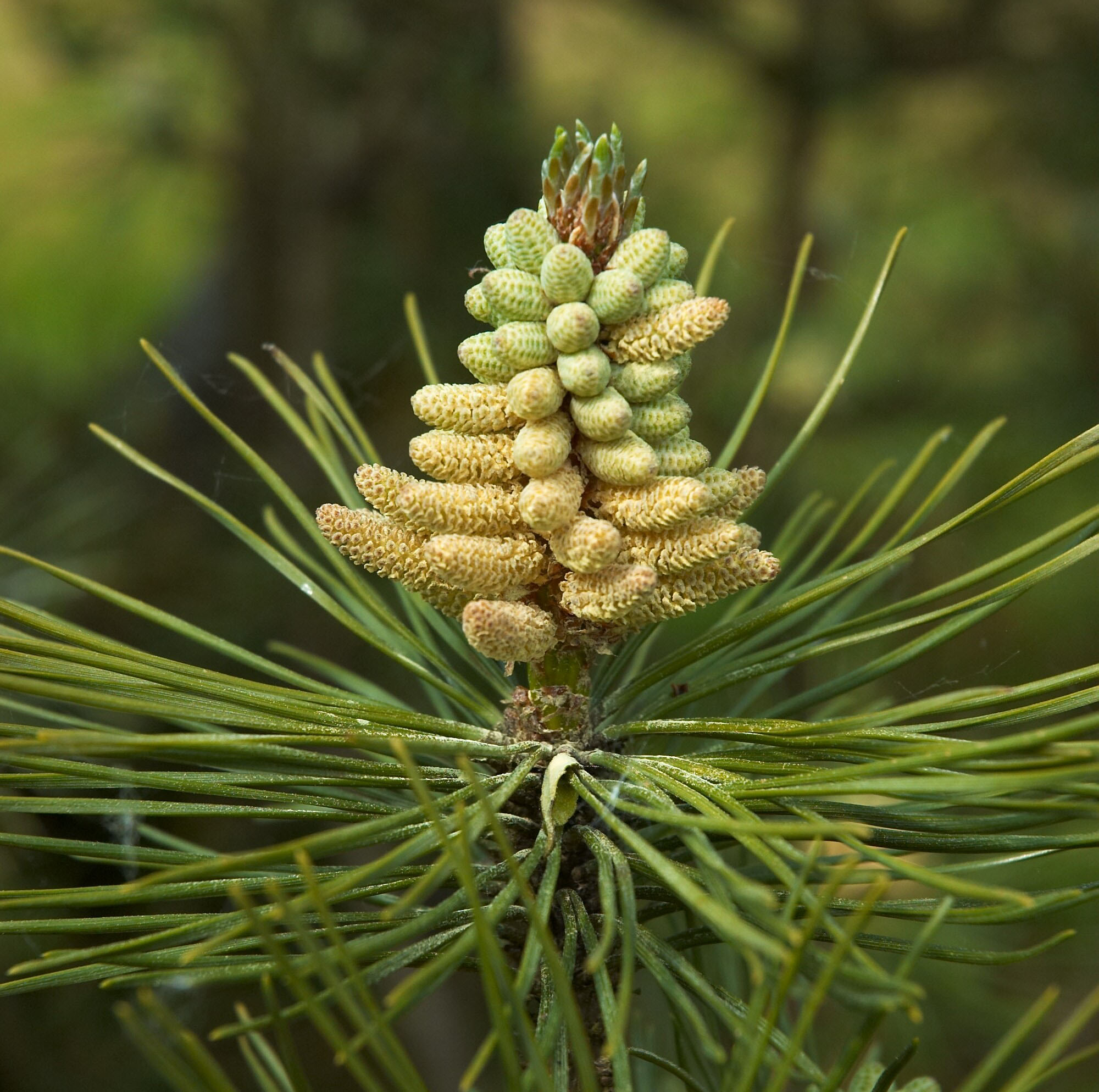 Pinus nigra (photo taken in Belgium)